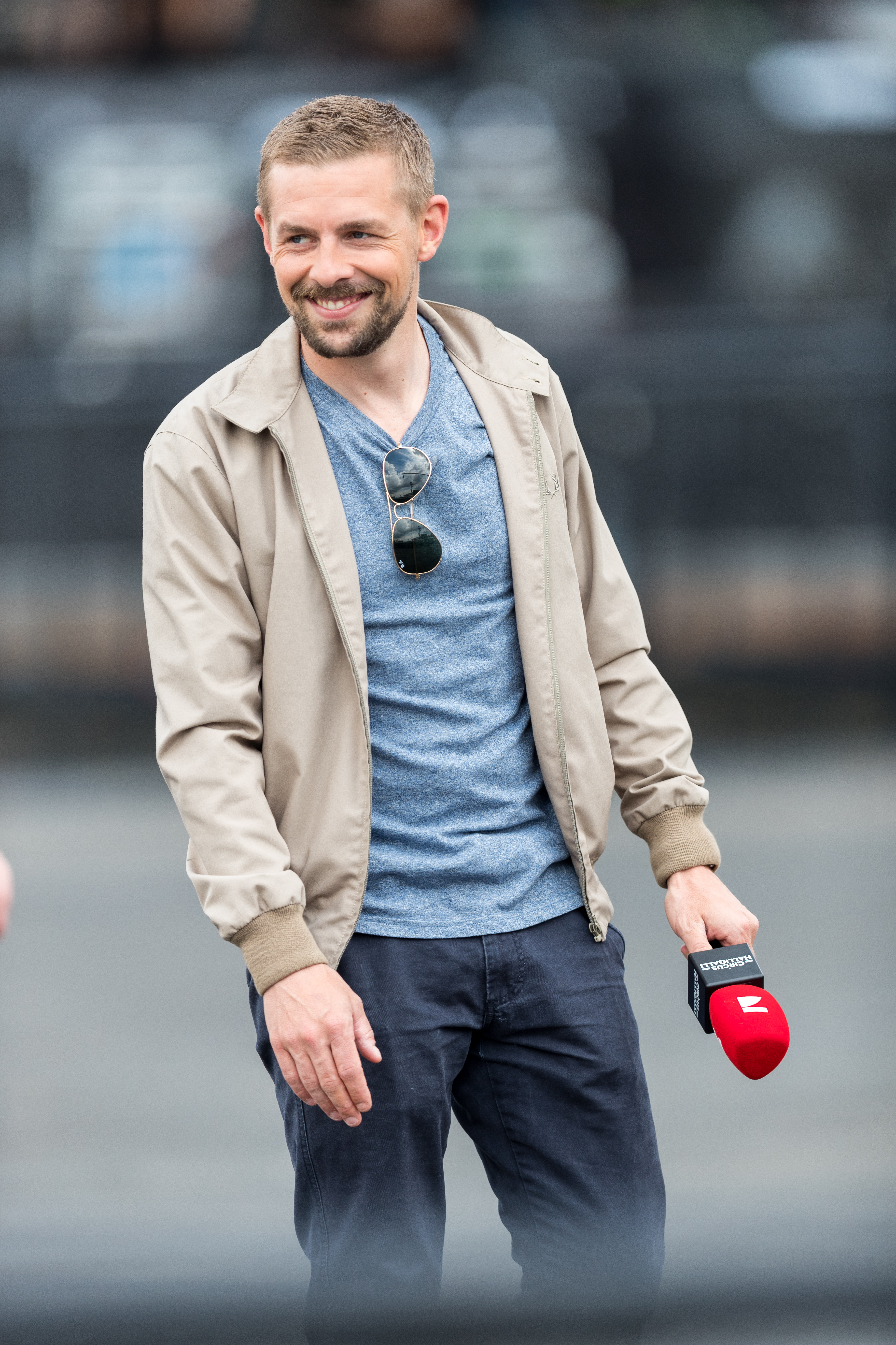 Joko und Klaas during Rock am Ring at Nürburgring, Nürburg, Rheinland Pfalz, Germany on 2017-06-03, Photo: Sven Mandel